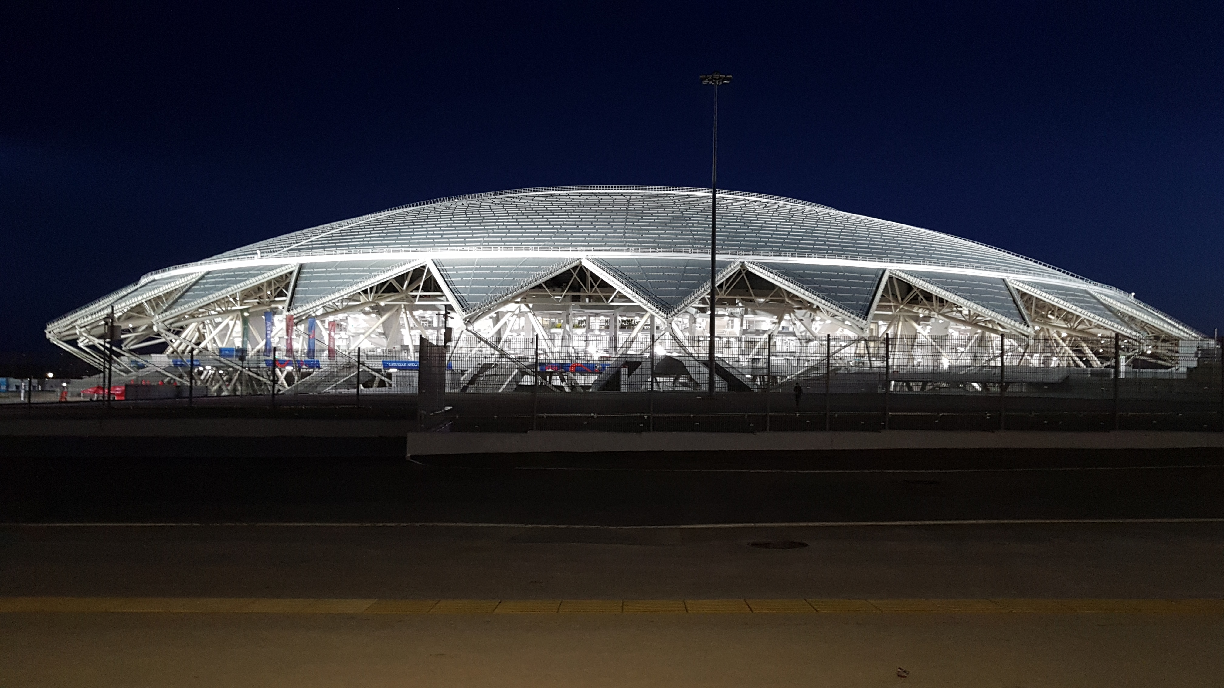 Фото стадиона Самара Арена после первой игры Чемпионата Мира по Футболу 2018